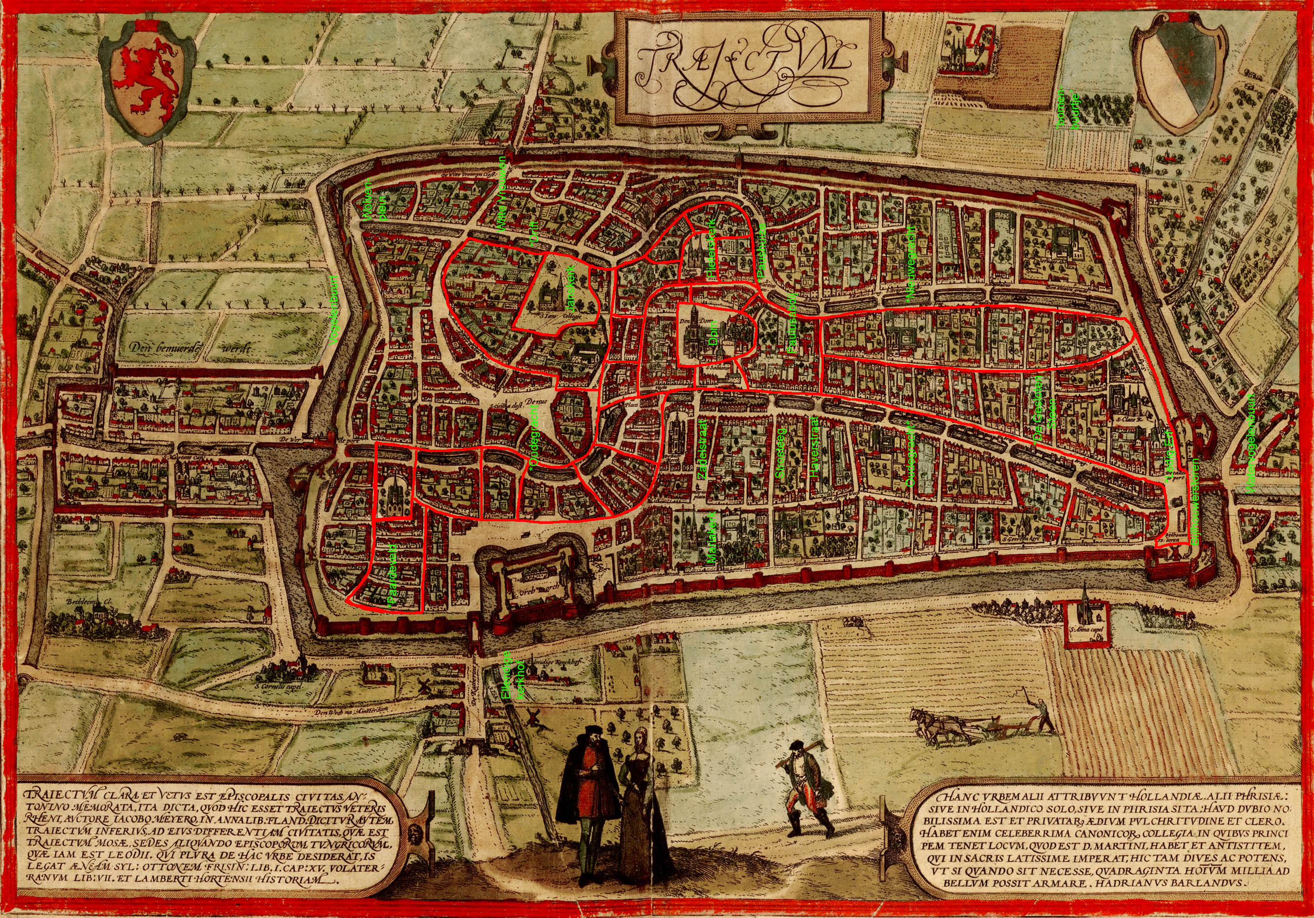 Stadsplattegrond Utrecht 1572 met toegevoegd geoglief en aanduidingen